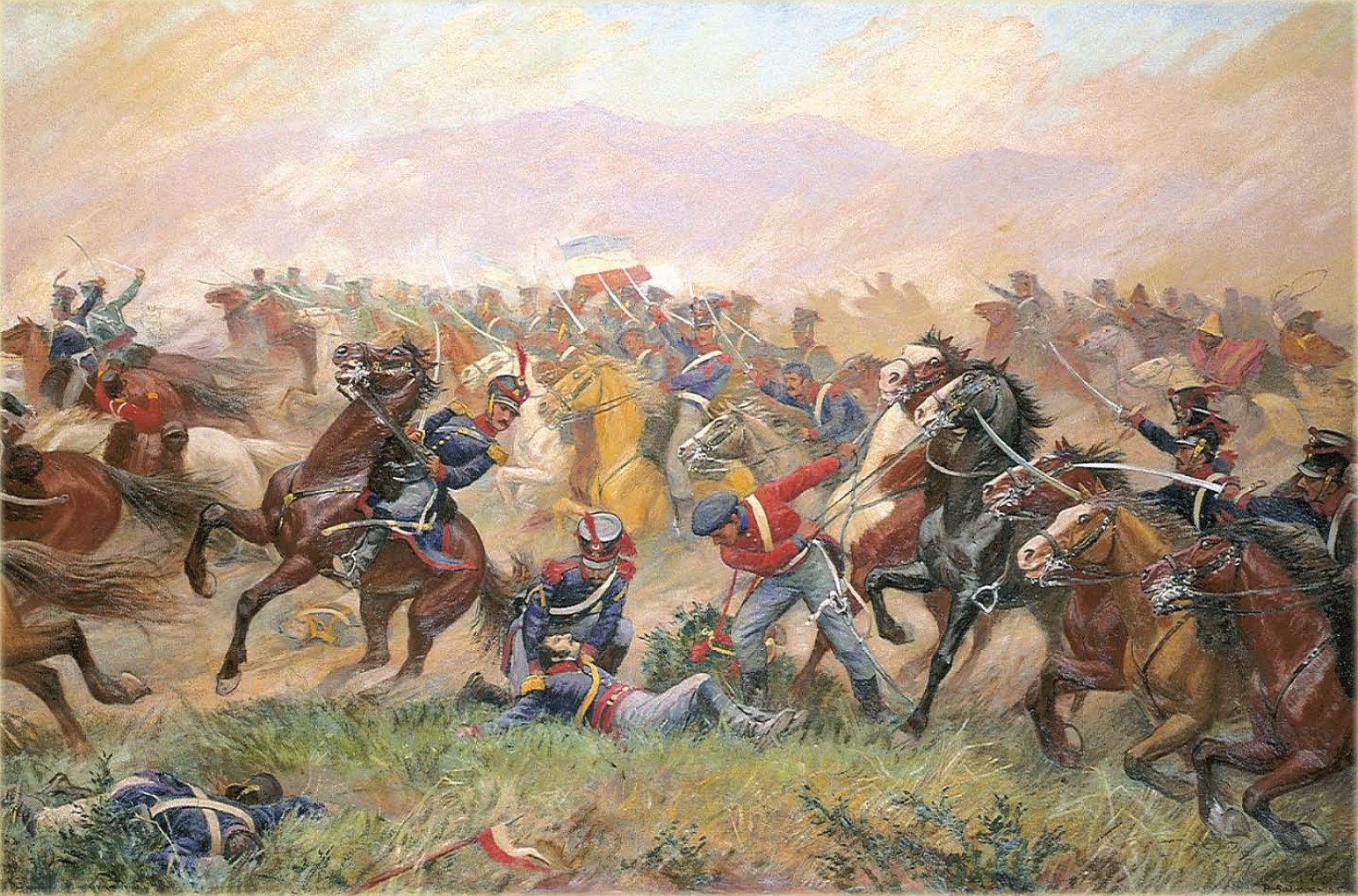 La muerte de Bueras muestra la muerte de Santiago Bueras Avaria, ocurrida en la batalla de Maipú (5 de abril de 1818)